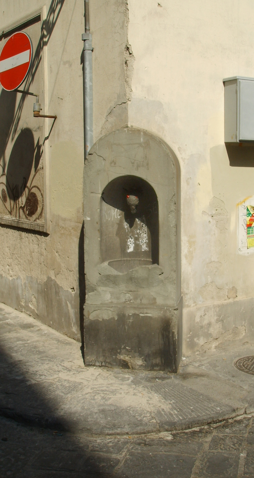 Fontana_dell'agnellino In florence